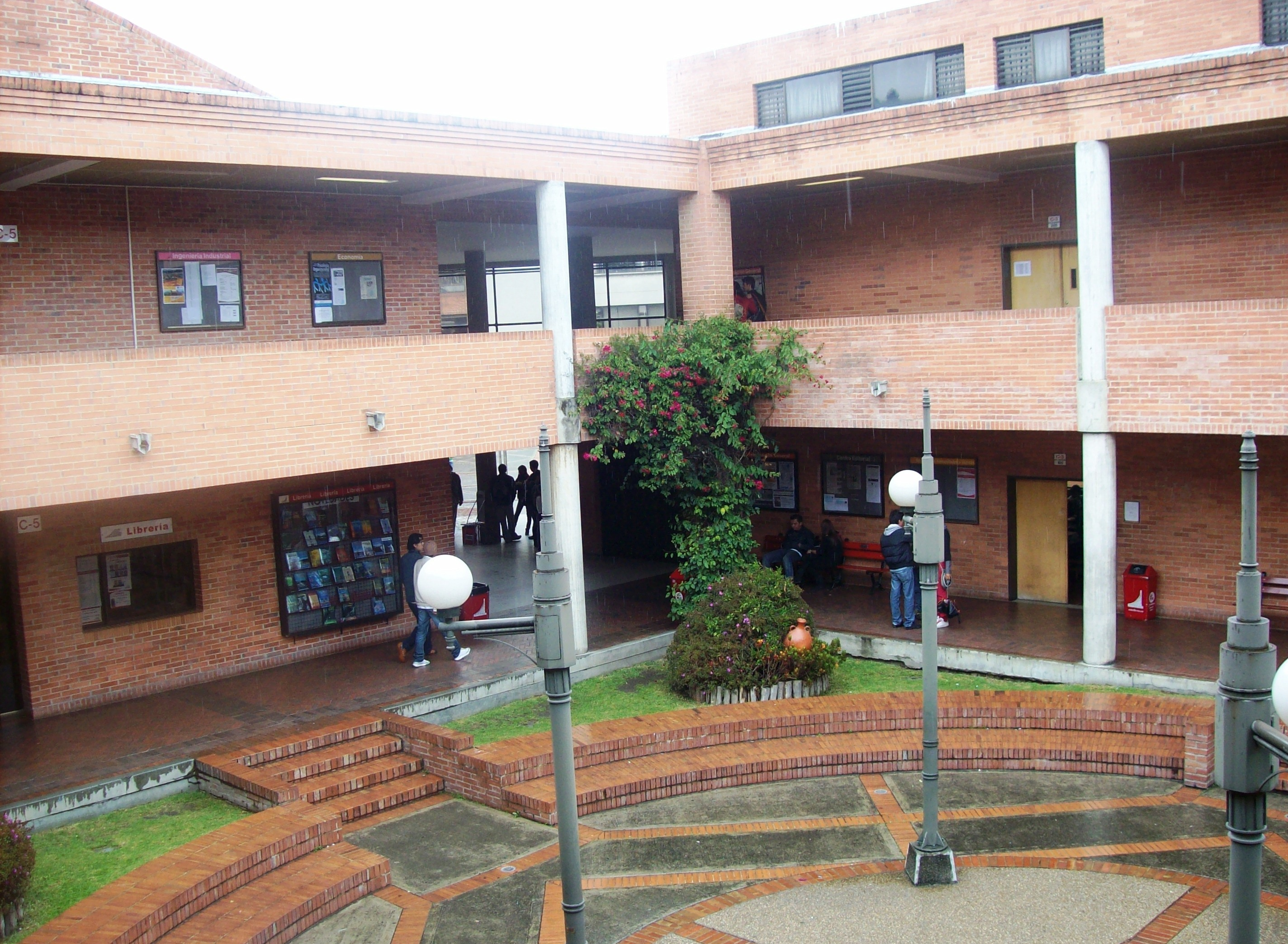 Interior del bloque C de la Escuela Colombiana de Ingeniería Julio Garavito